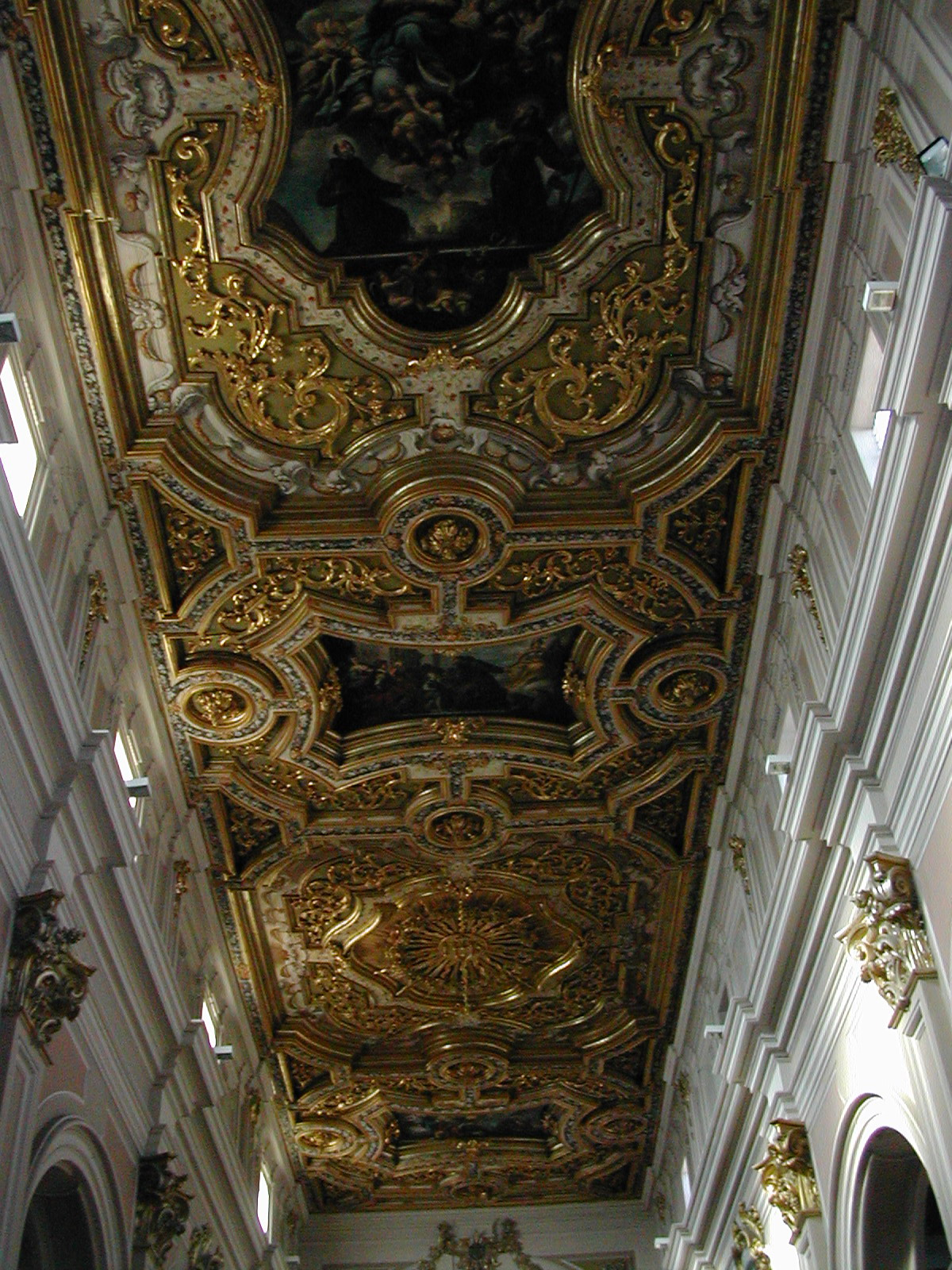 l'Aquila Basilica di San Bernardino